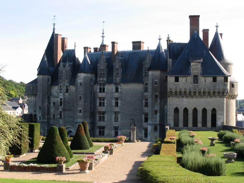 Chateau de Langeais